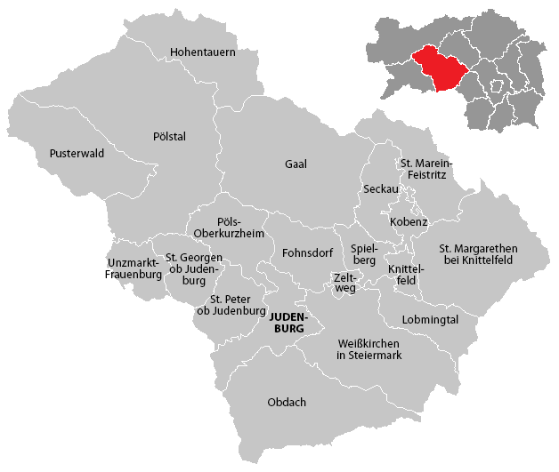 Gemeinden im Bezirk Murtal (Steiermark), Stand: 1. Januar 2015